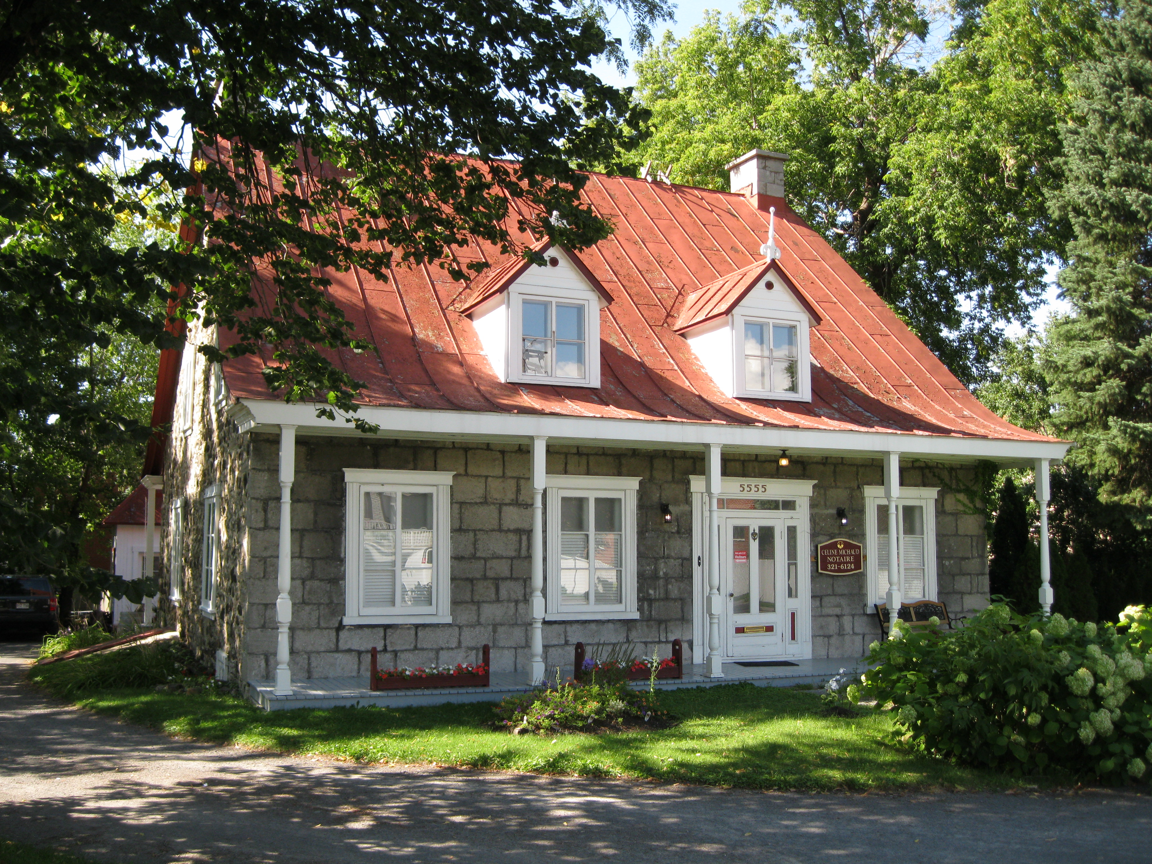 La maison Dagenais, reconnue monument historique, est une résidence d'inspiration française érigée entre 1774 et 1787. Elle est située au 5555, rue Jarry Est, dans l'arrondissement de Saint-Léonard, à Montréal.